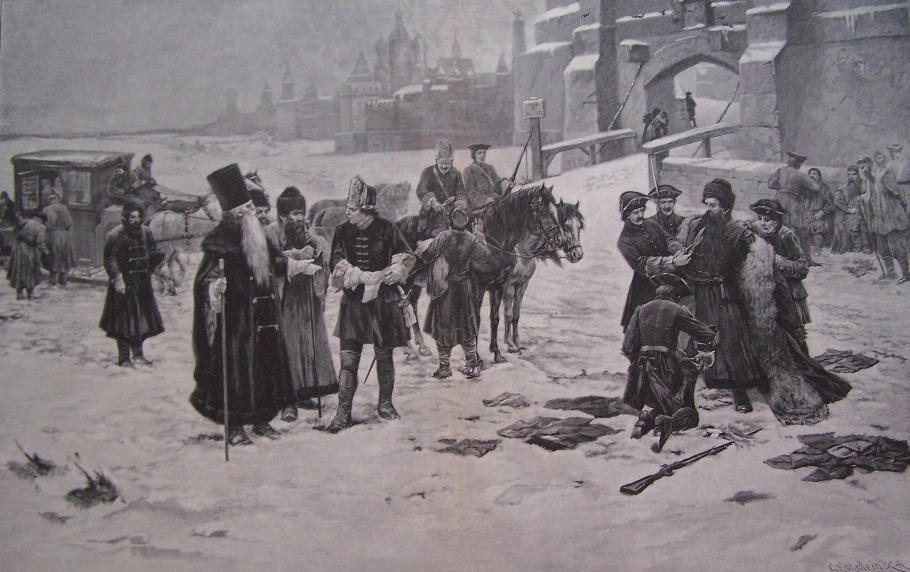 Реформы Петра (запрет на бороды и традиционную одежду)